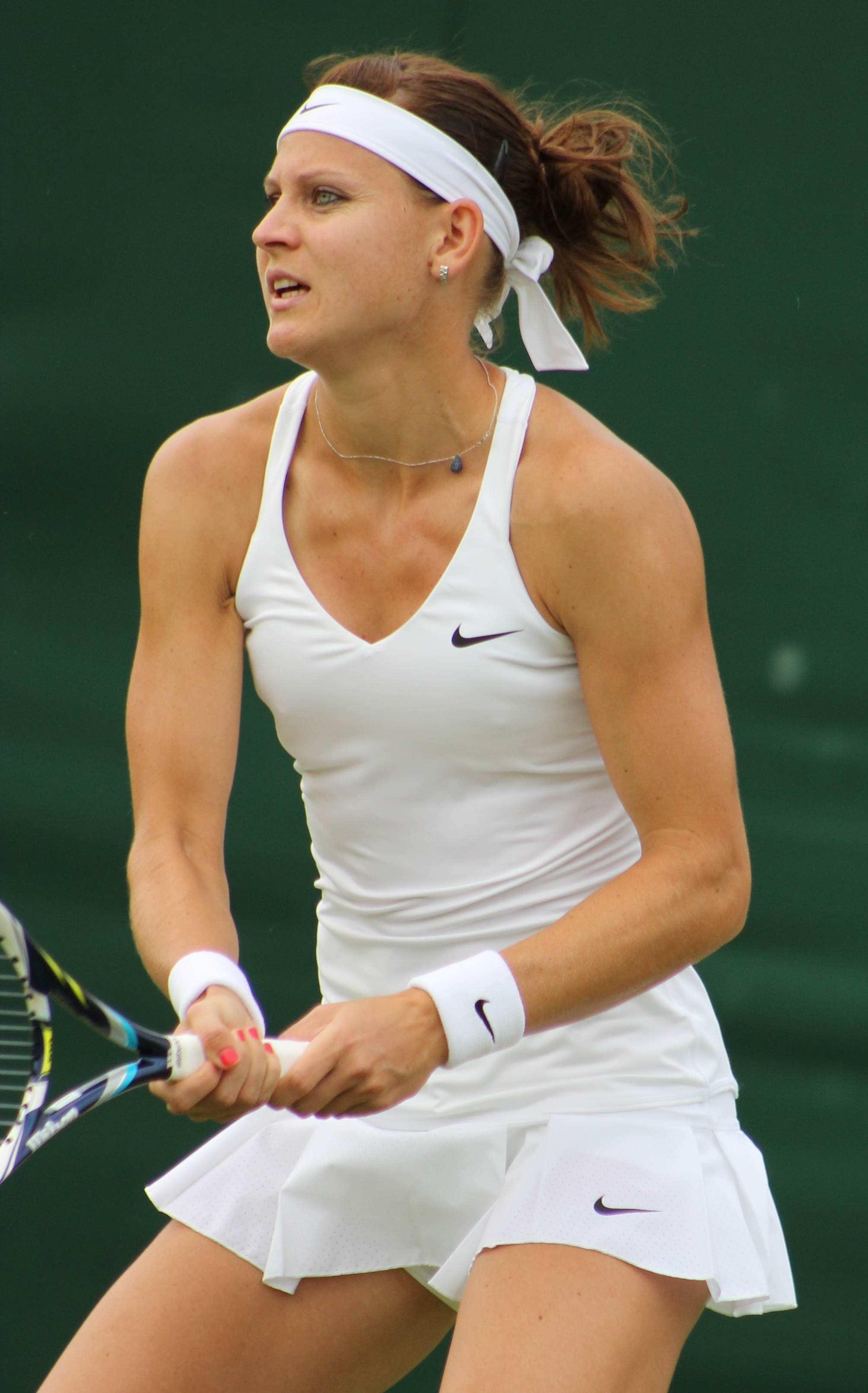 Safarova WM14 (9)